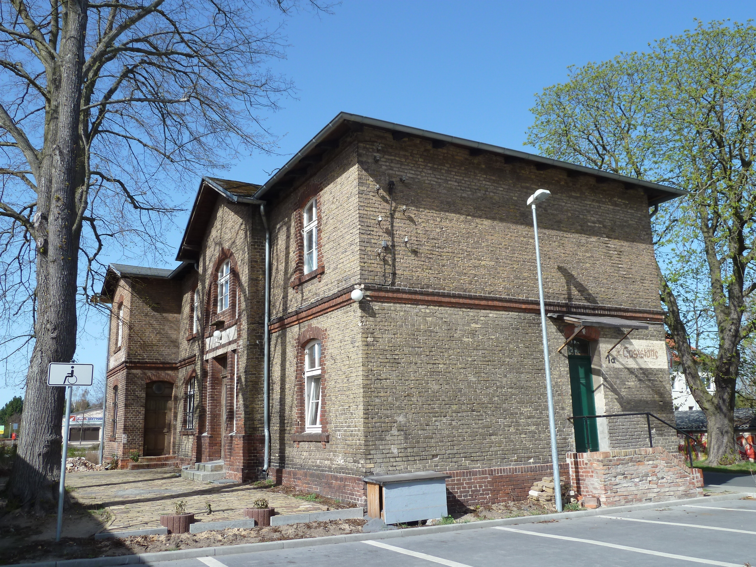 Ehemaliger Bahnhof Lehnin